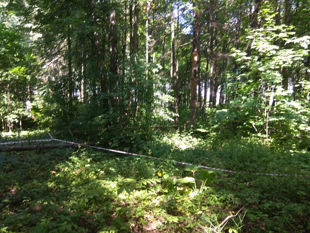 Лес в усадьбе Опалиха-Алексеевское